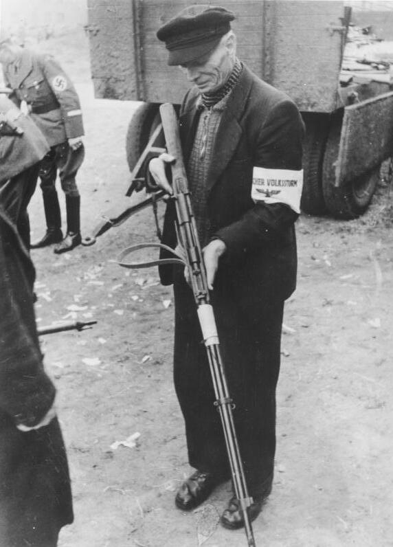 Das deutsche Volk steht auf Der Führer verkündete den Volkssturm. Jeder Mann erhält sein Gewehr. Meist sind es alte Weltkriegsteilnehmer, die schon einmal ihre Heimat gegen den Feind verteidigten. Foto: SS.-PK. Falkowski/Transocean Europapress